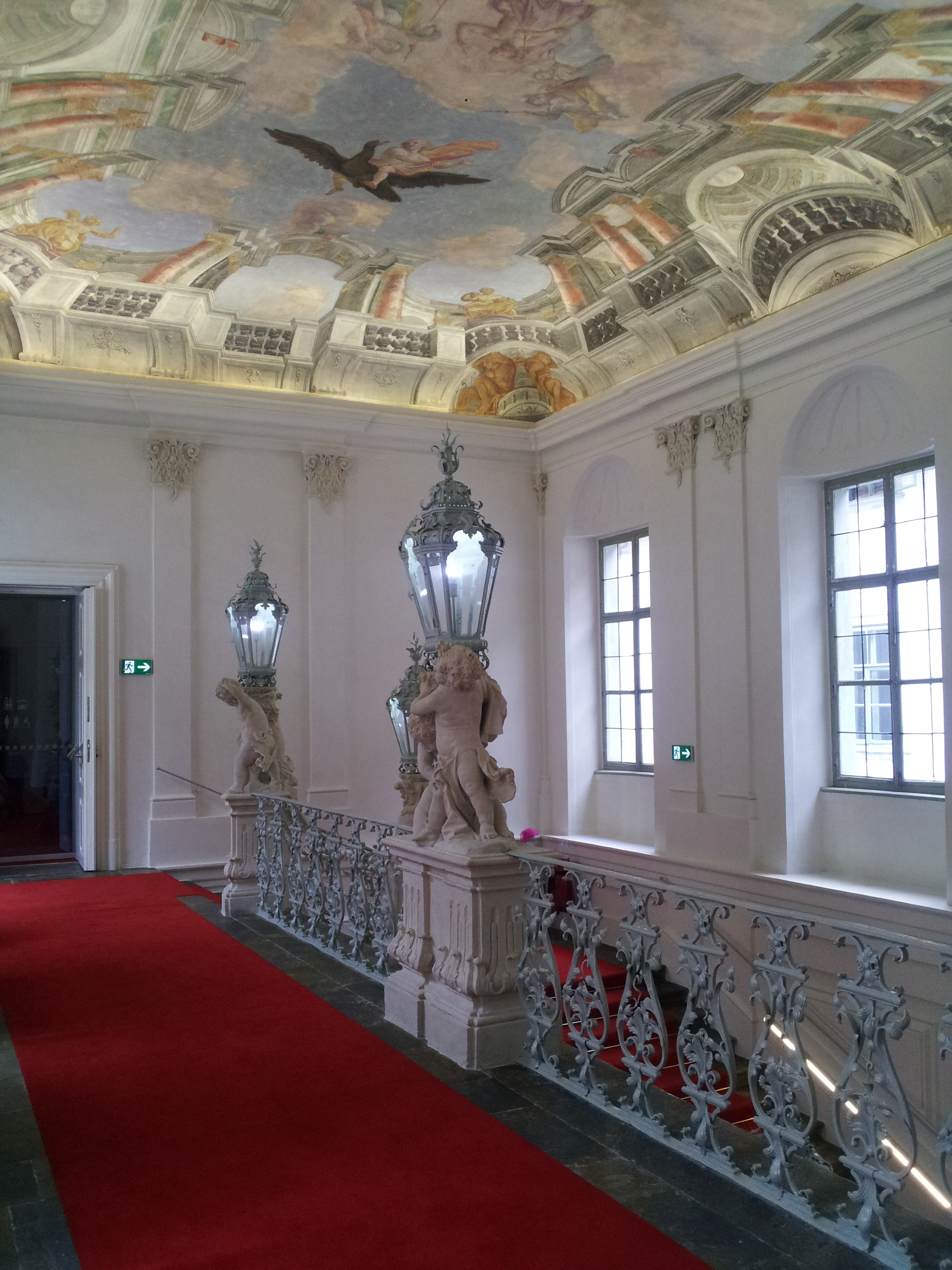 Ehem. Palais Herberstein, Landesmuseum Joanneum, Museum im Palais - Prunkstiege mit illusionistischem Deckenfresko